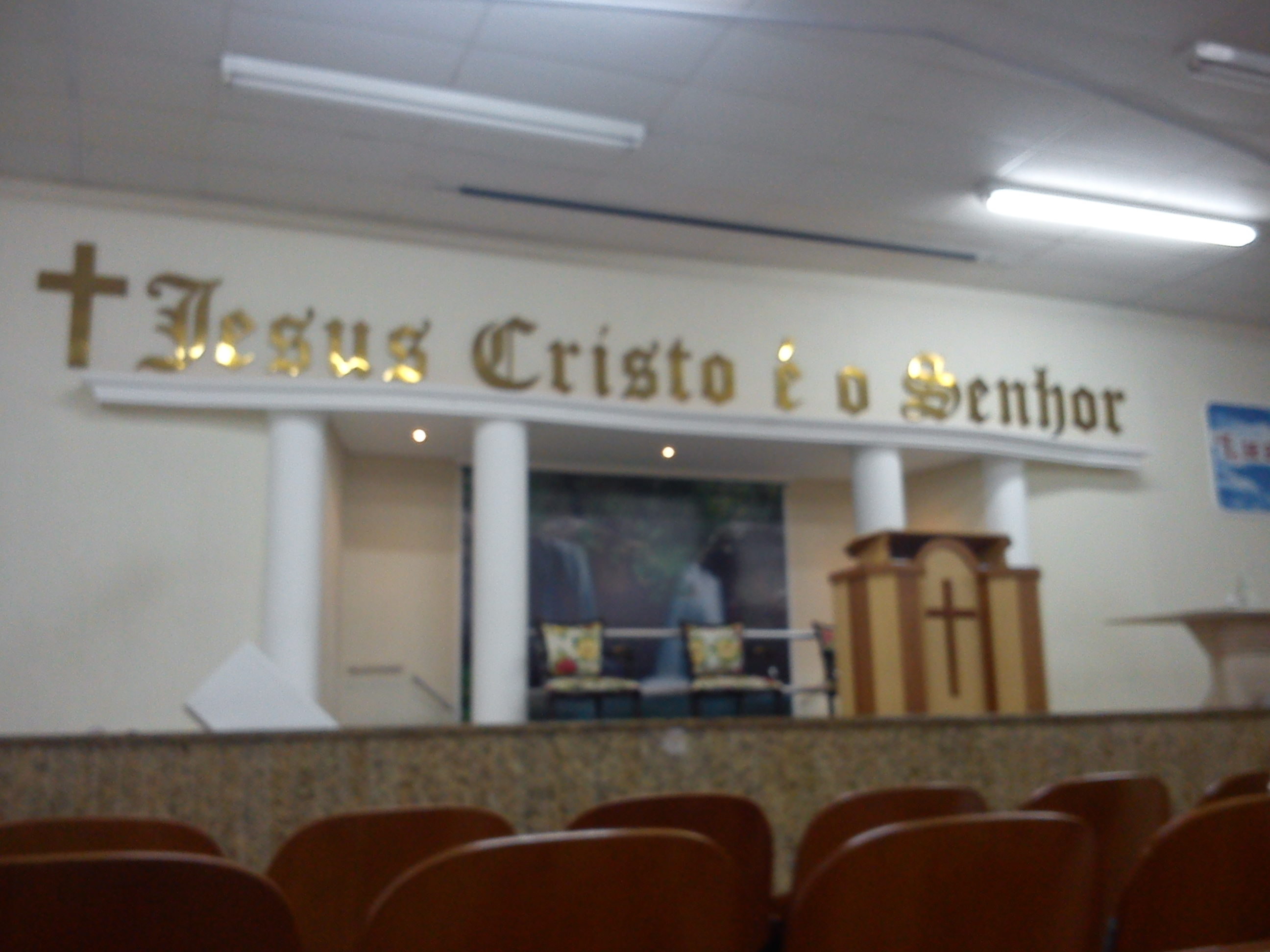 Fachada do altar da IURD em Bal. Camburiu